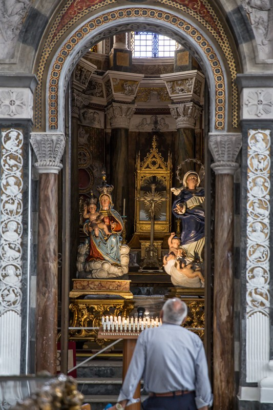 cappella